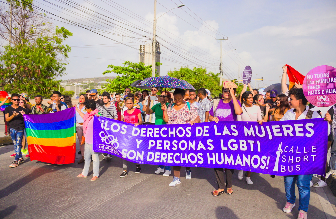 Día Internacional contra la discriminación por orientación sexual, identidad de género y su expresión.Location: Cartagena, ColombiaEvent type: Día Internacional contra la discriminación por orientación sexual, identidad de género y su expresión.Date or year: 2019